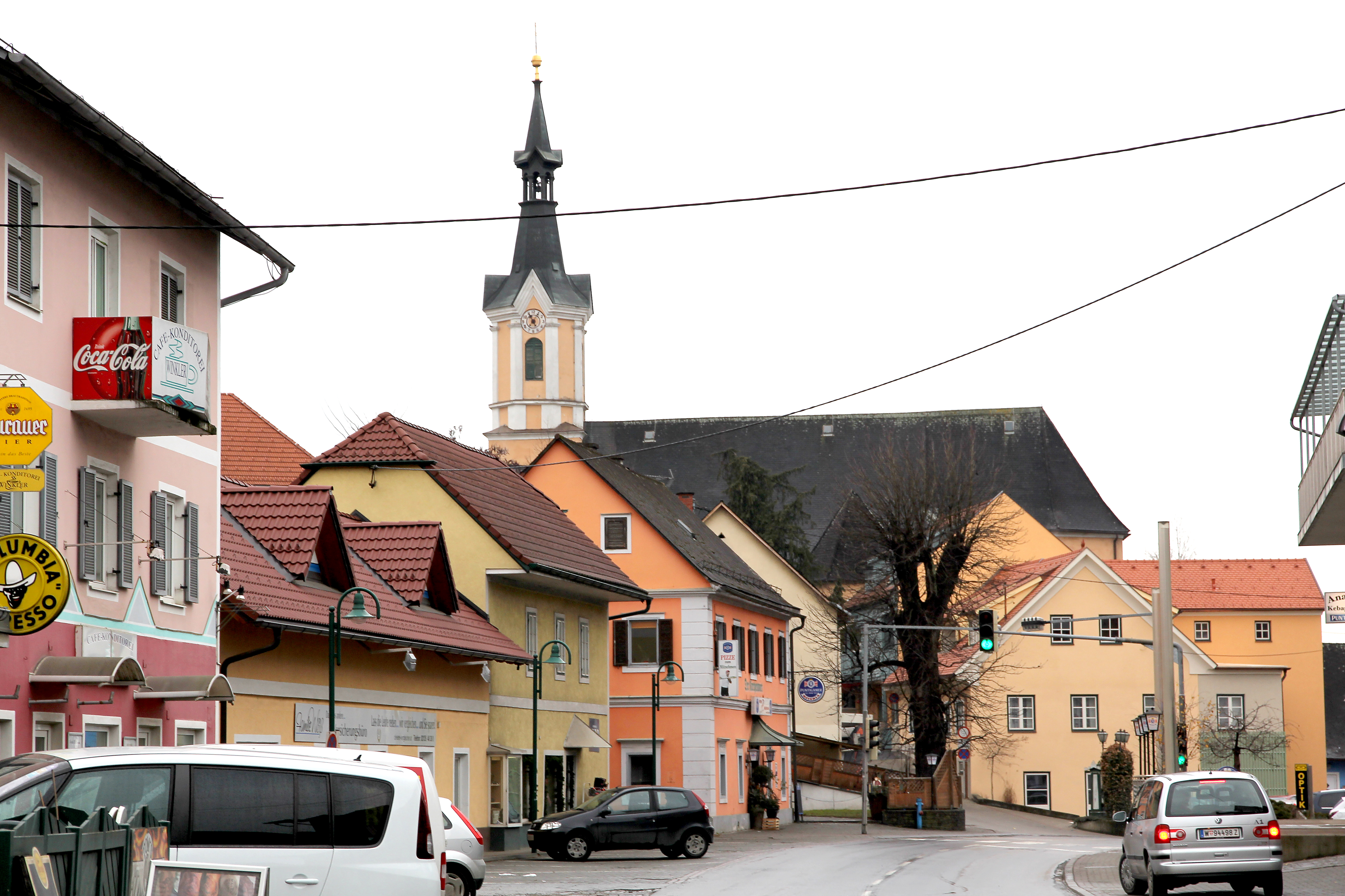 Ortskern